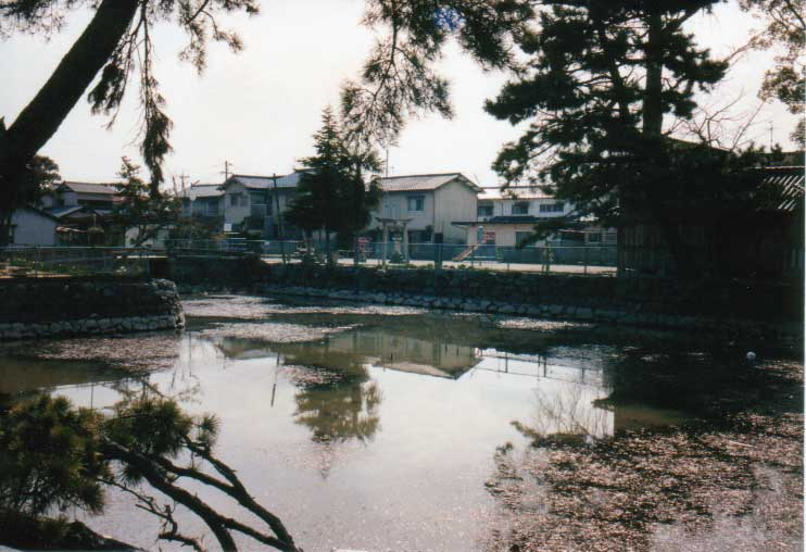 庭瀬陣屋跡（旧・庭瀬城二の丸） 1992年6月投稿者撮影 Category:日本の城画像